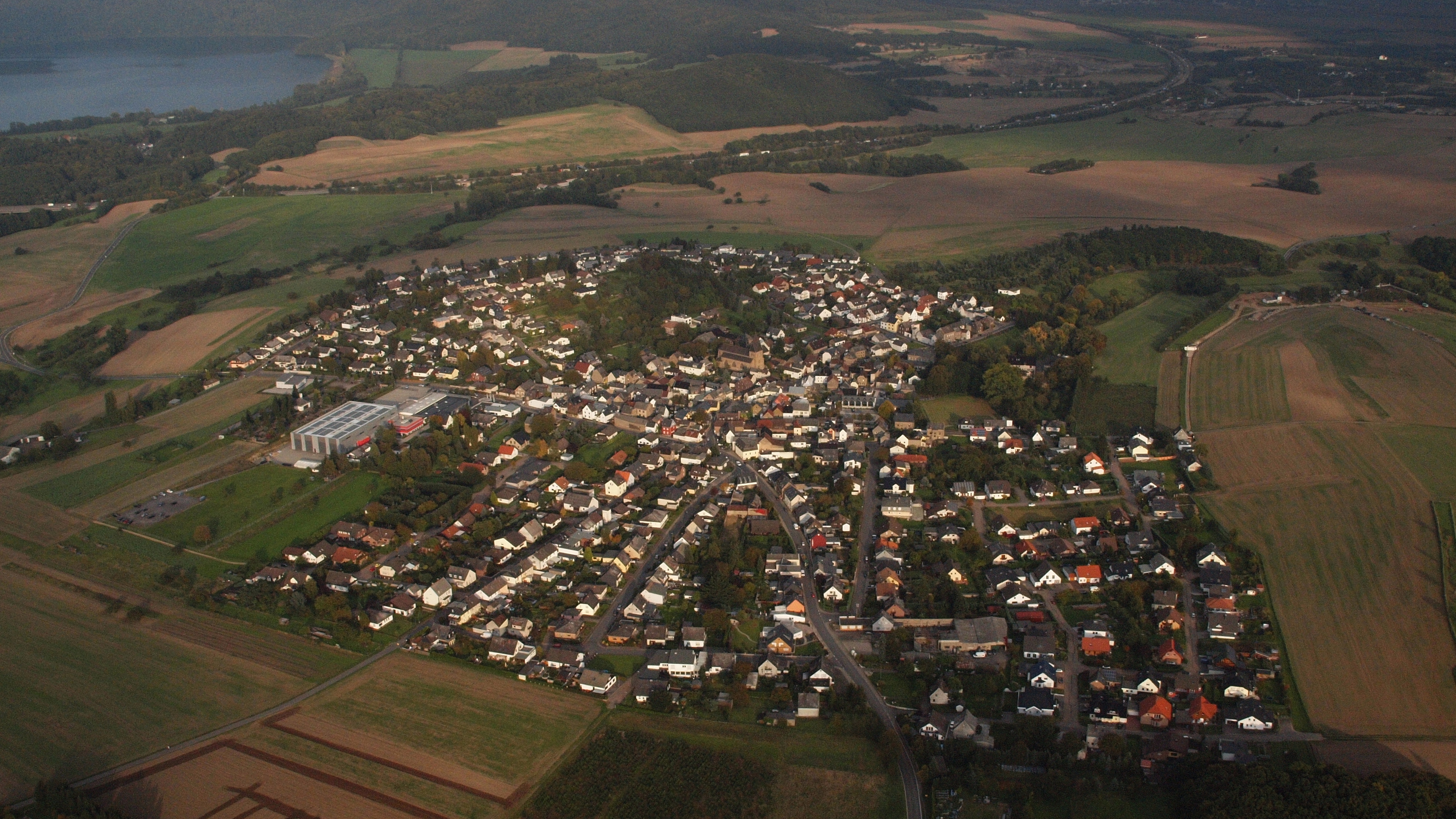 Bell, Luftaufnahme (2014)